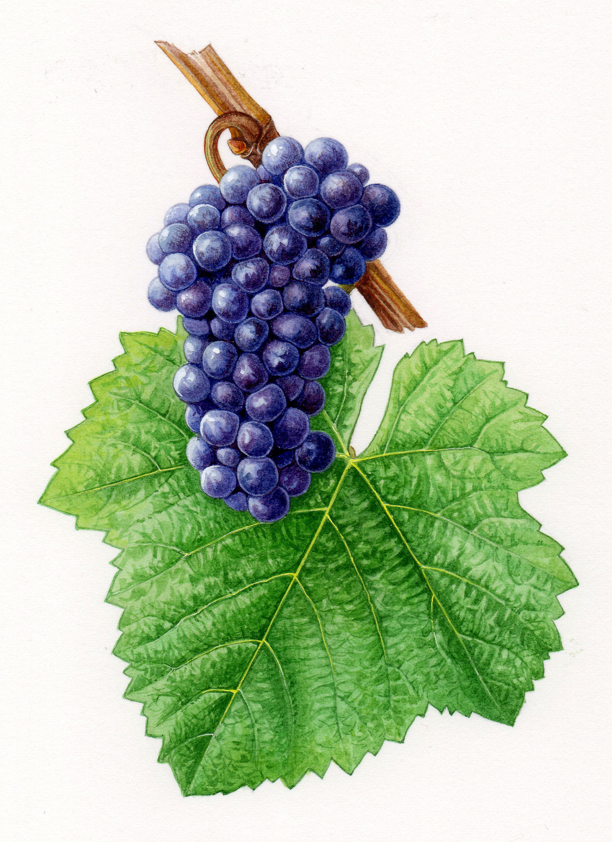 aquarelle originale des cépages de France (2001)